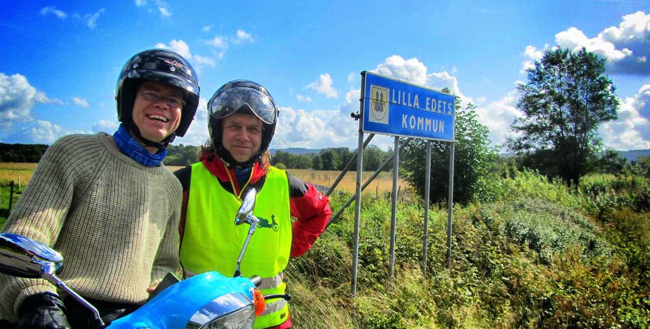 Meteorologen Pär Holmgren är tillsammans med musikern Staffan Lindberg initiativtagare till Elmopedturnén som är Sveriges största turnerande miljöevenemang.